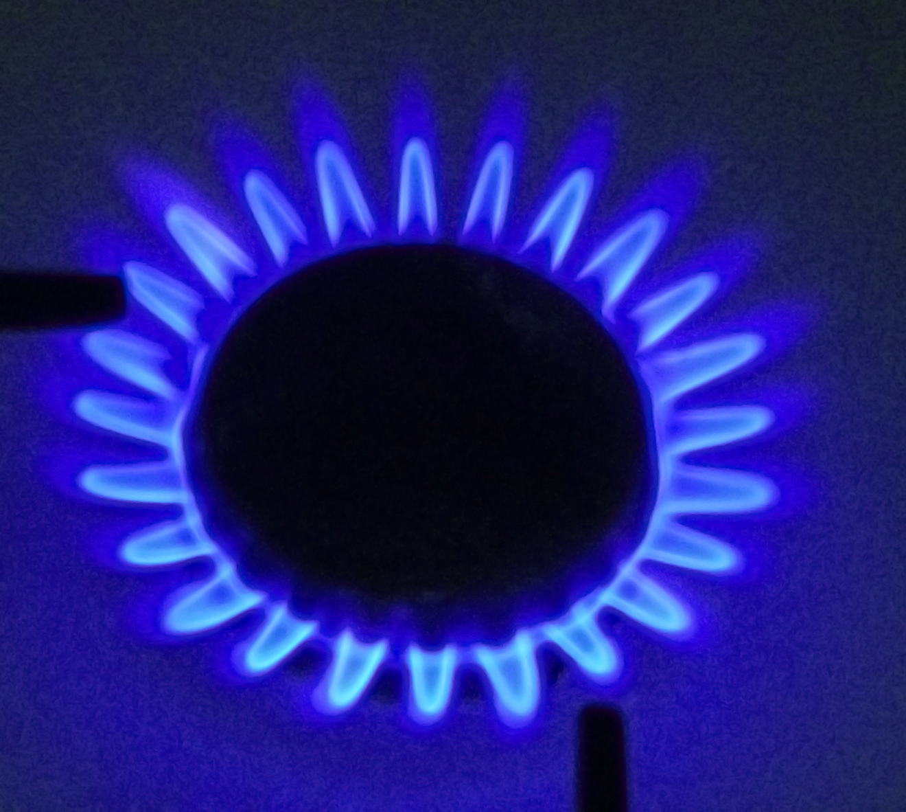 Газовая горелка